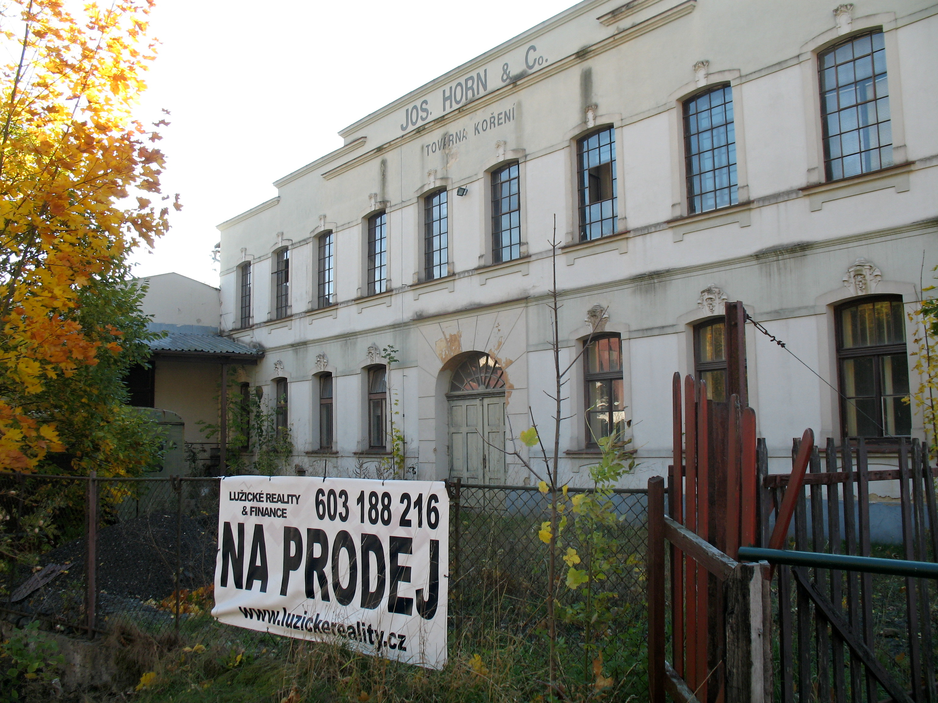 Bývalý vodní mlýn na koření Josefa Horna v Dolní Chřibské, okres Děčín